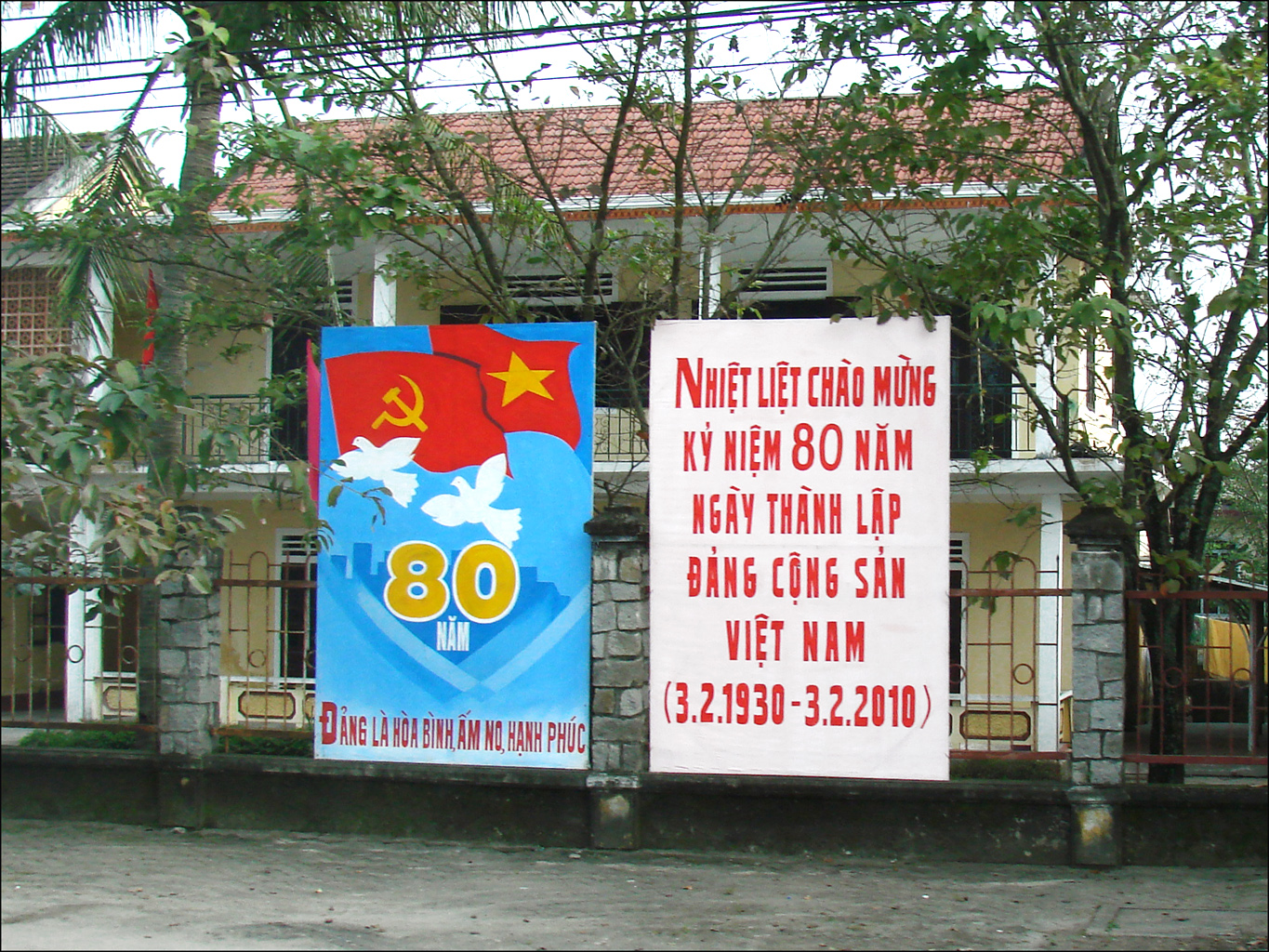 Panneau pour le 80ème anniversaire de la fondation du parti communiste vietnamien Le Parti communiste vietnamien a été fondé par Hô Chi Minh en 1930. Il était alors appelé Parti communiste indochinois.